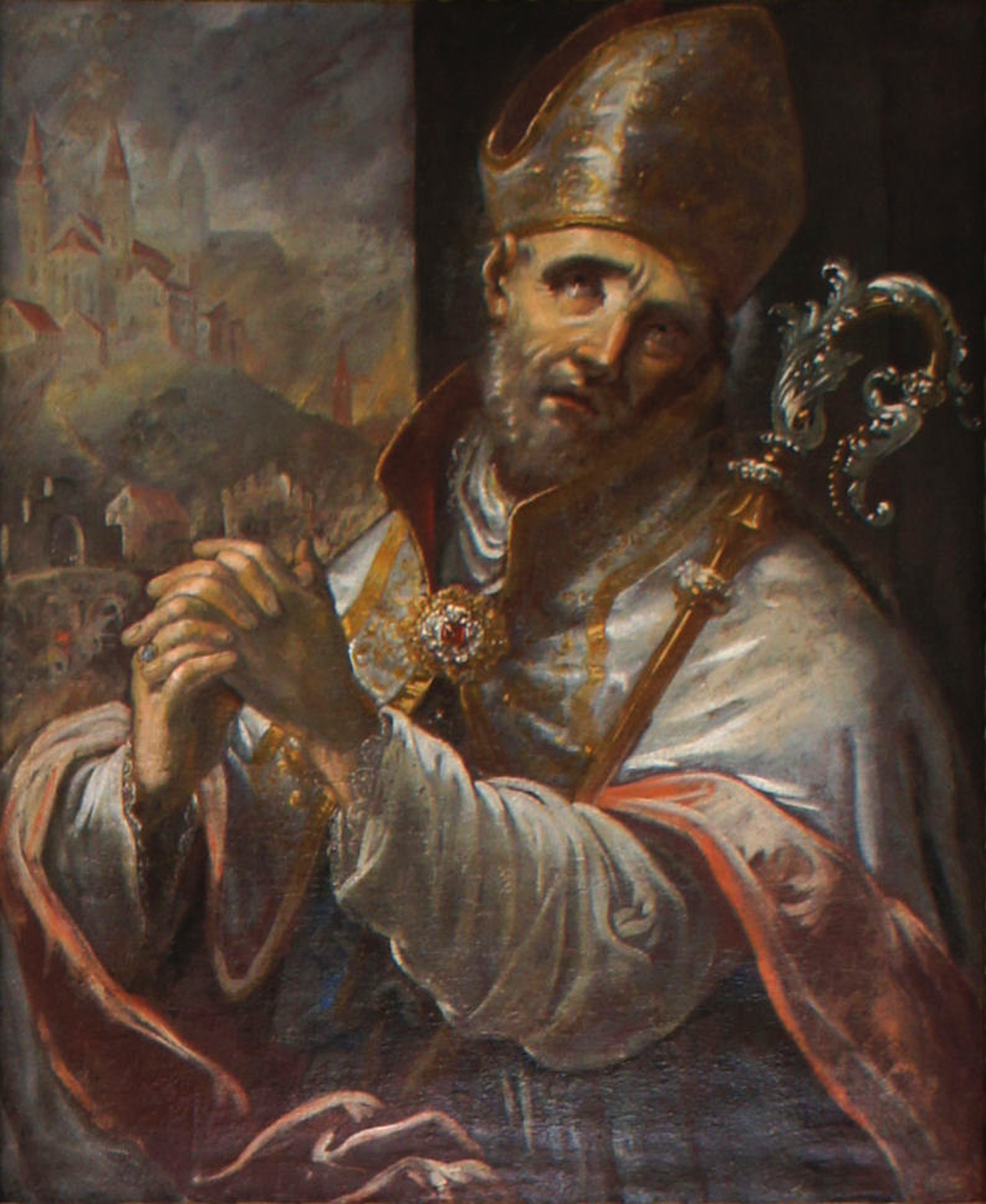 Porträtgemälde des Hl. Lantpert, Bischof von Freising, im Fürstengang zwischen Fürstbischöflicher Residenz und Freisinger Dom.